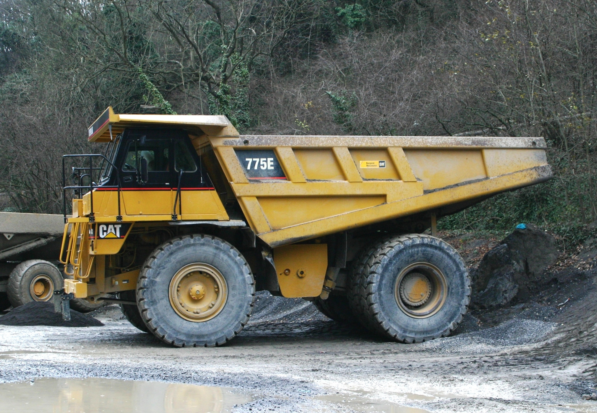 Caterpillar 775E